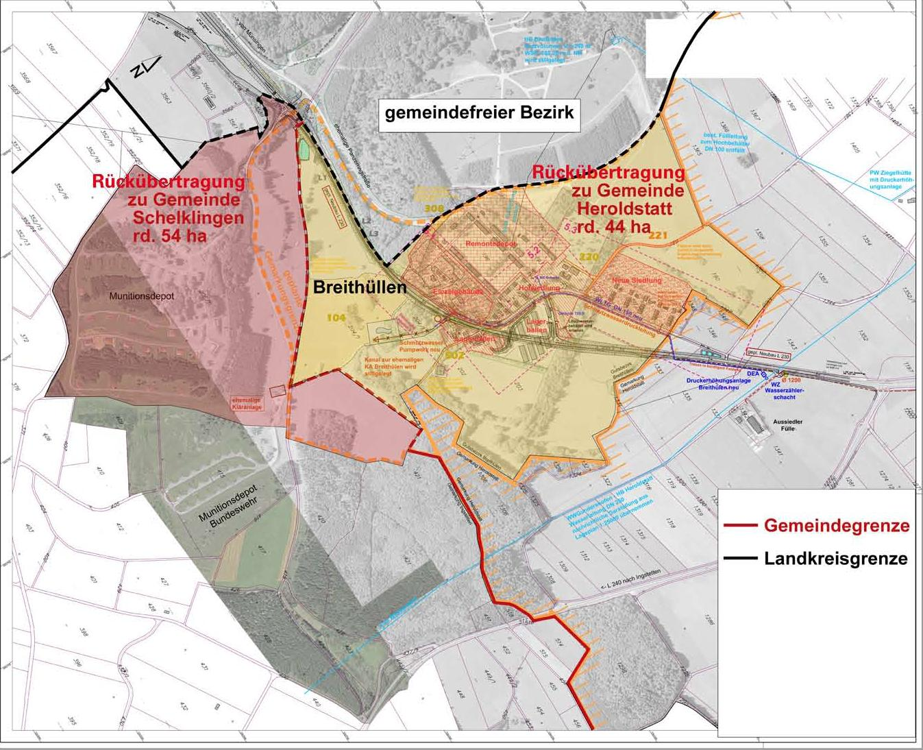 Flächen der Rückübertragung vom Gutsbezirk Münsingen an die Gemeinden Heroldstatt (Remontedepot und Wohnsiedlung Breithülen) und Schelklingen (Munitionsdepot Ingstetten).